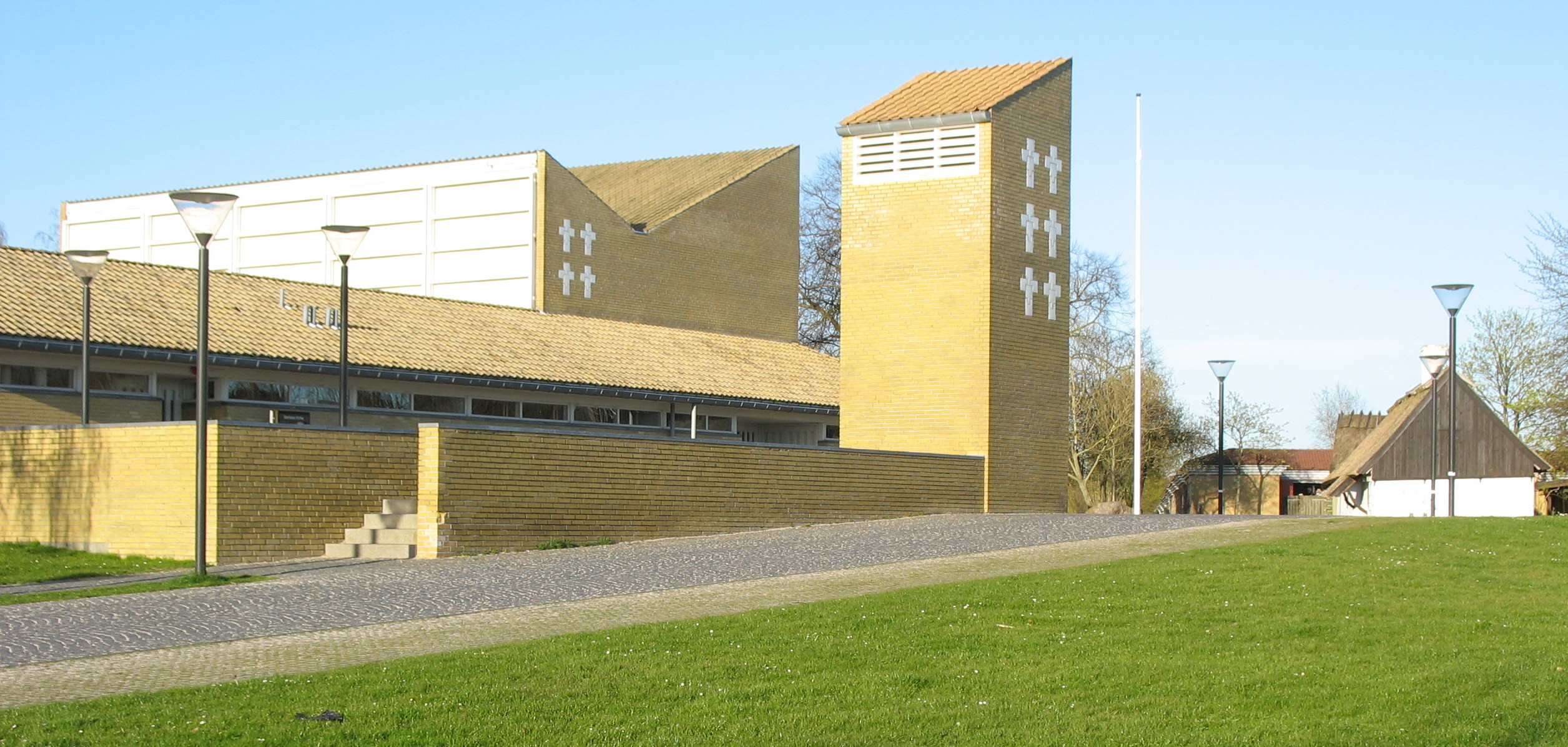 Værløse Kirke